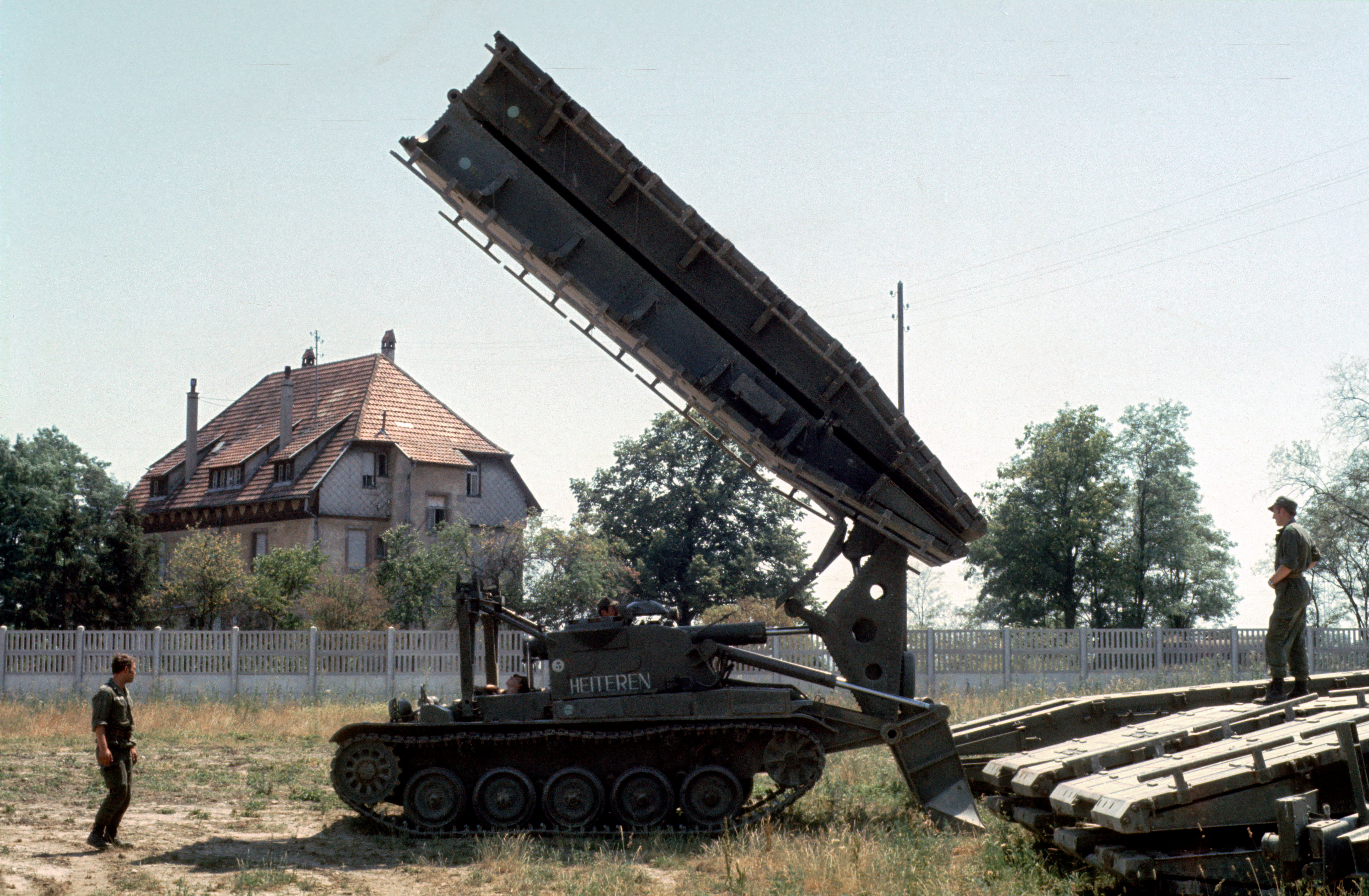 De G à D: Sgt Millet, 2e SM Stuiss , Adj Grosjean et 2e SM Ouroutski.